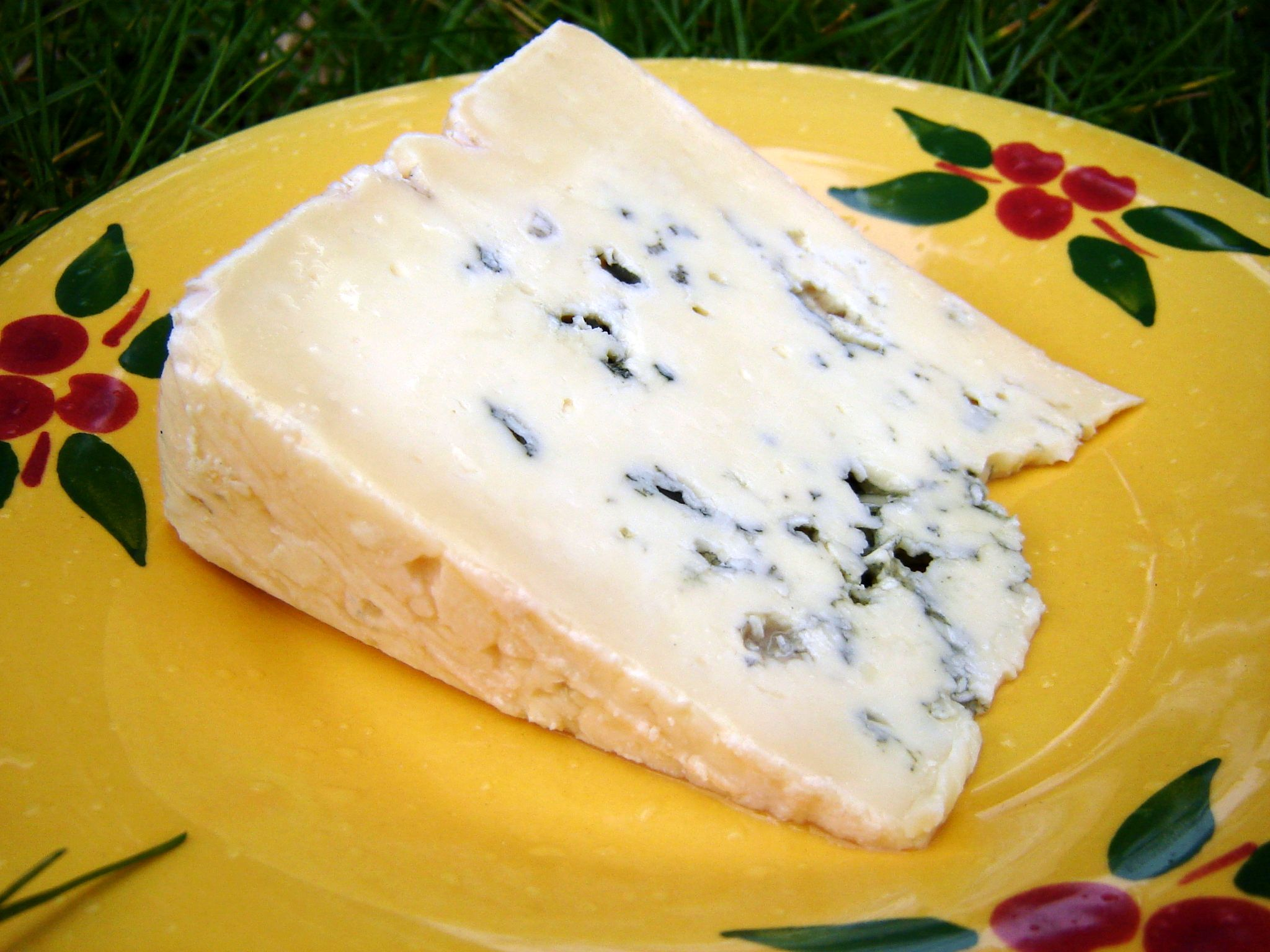 RoxanaS